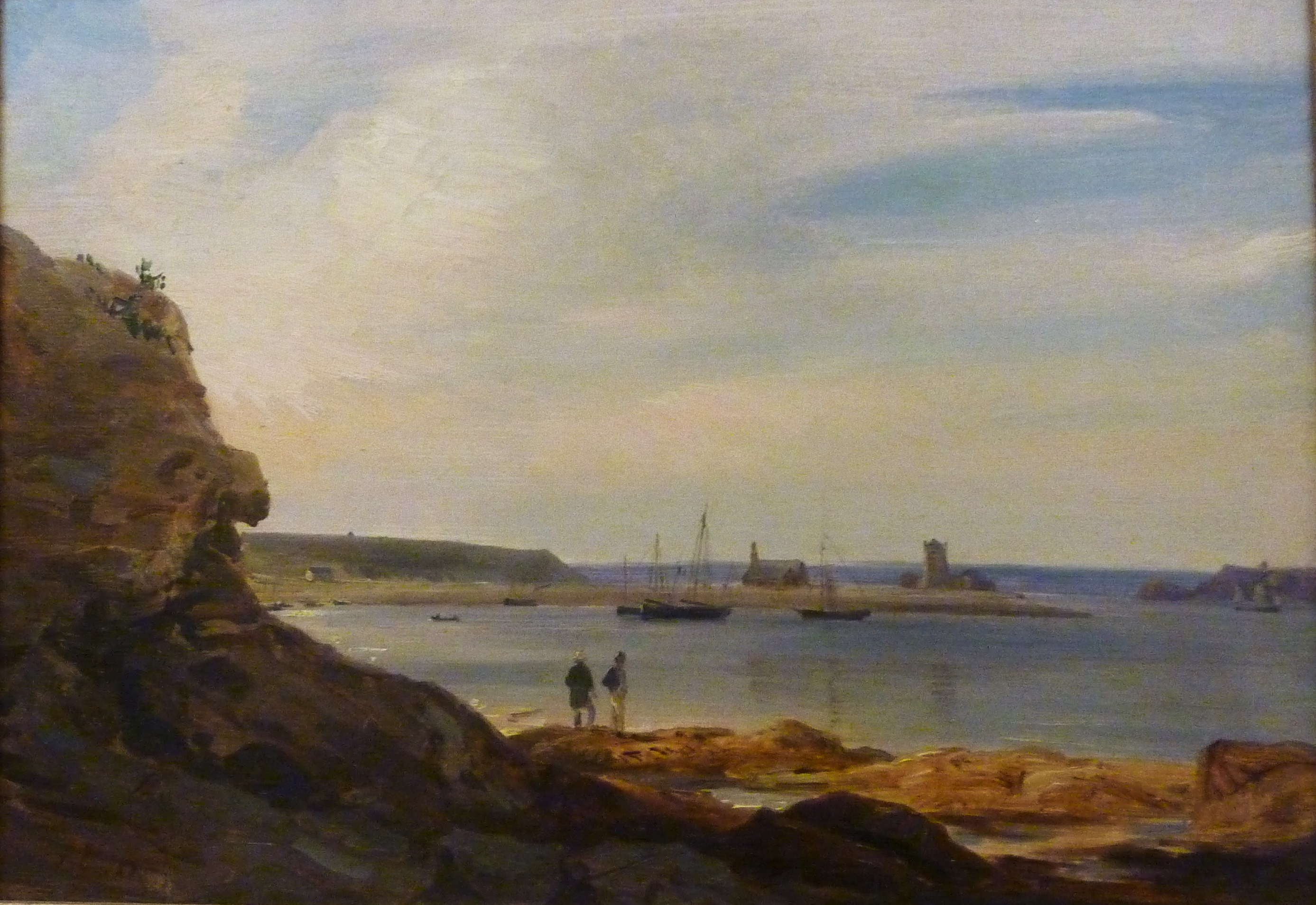 Le port de Camaret en 1830